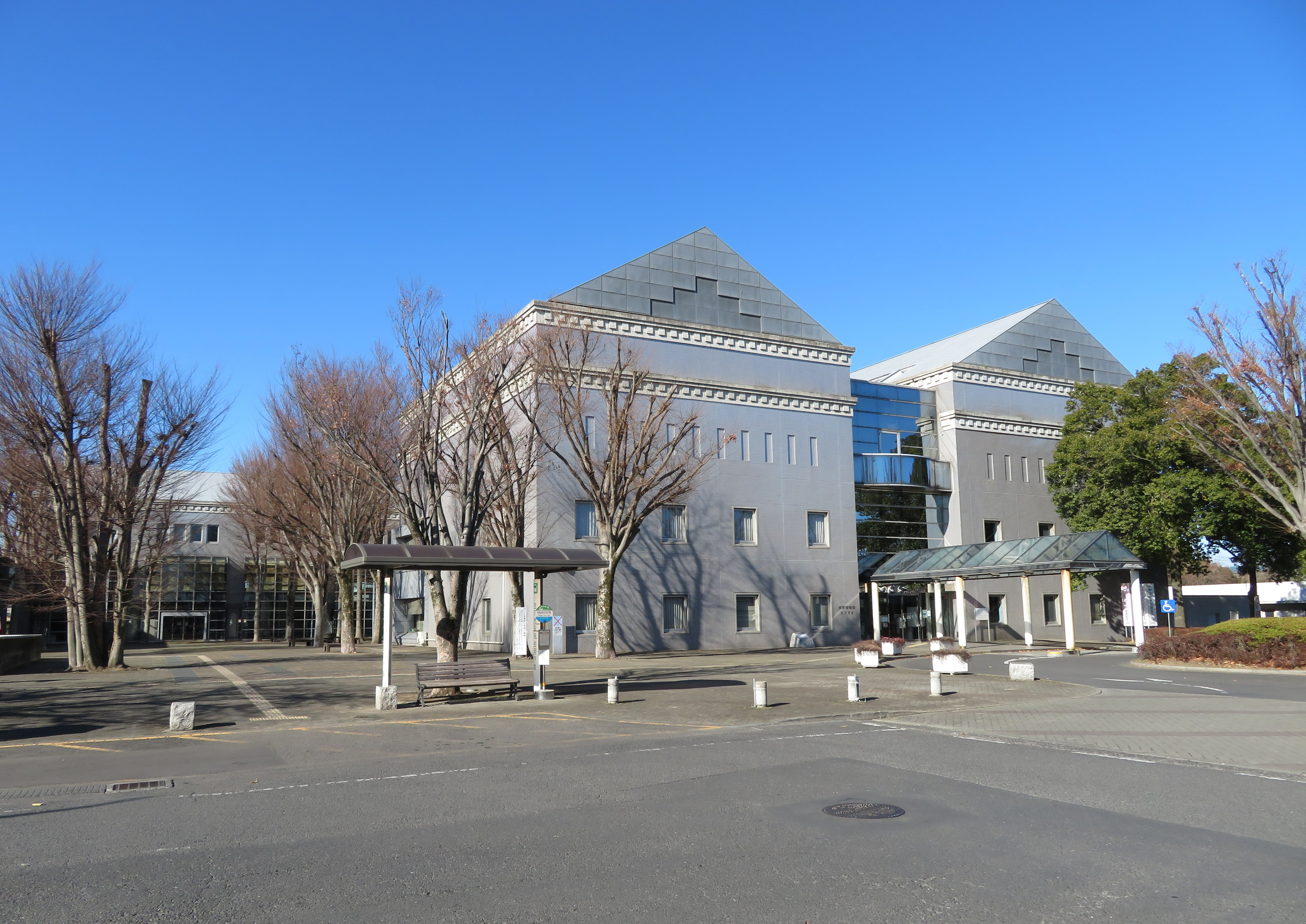 古河市役所古河庁舎（旧古河市役所） Canon PowerShot SX720 HS